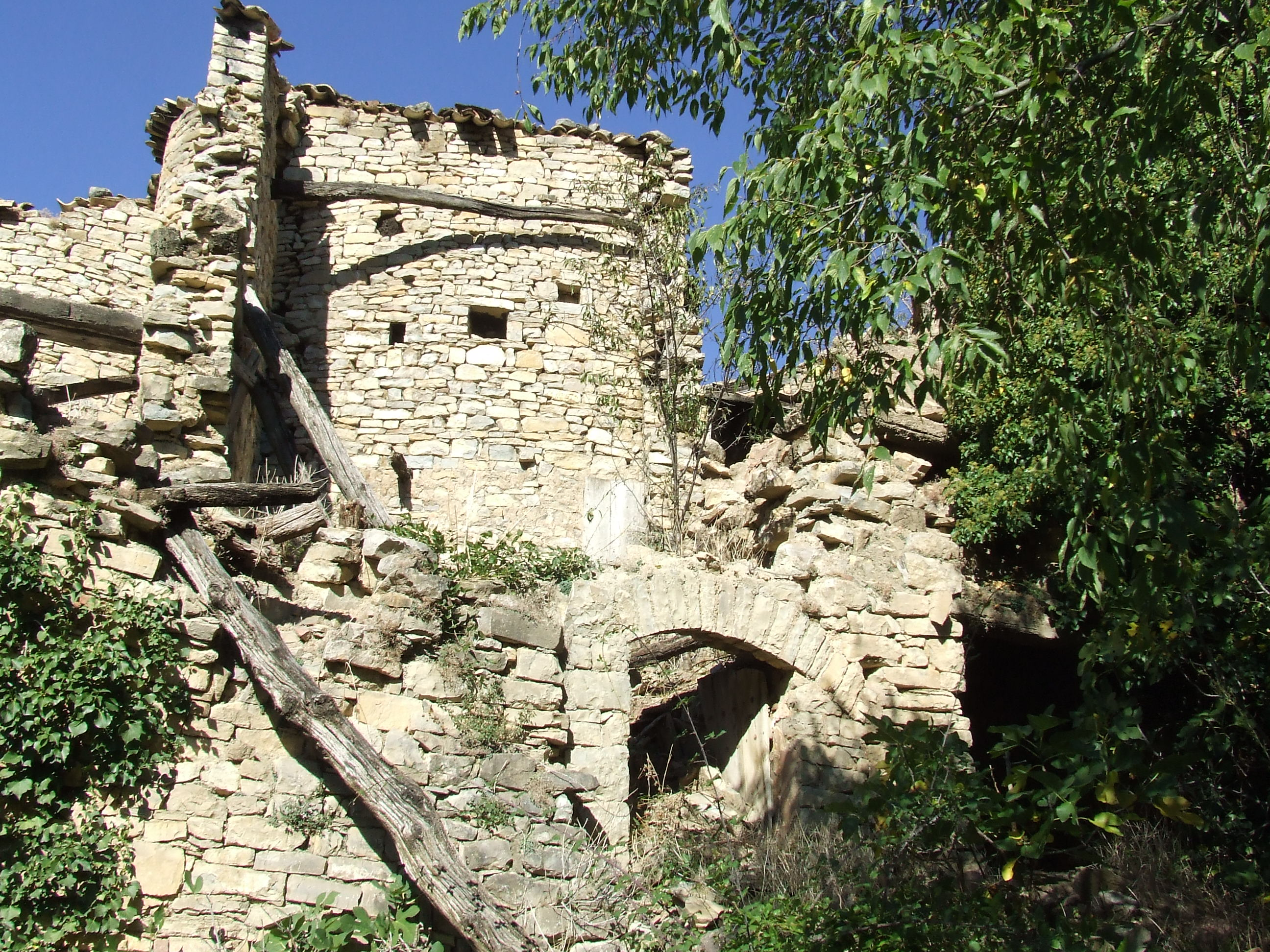 Possibles restes del castell de Montesquiu (Orcau, Isona i Conca Dellà, Pallars Jussà)